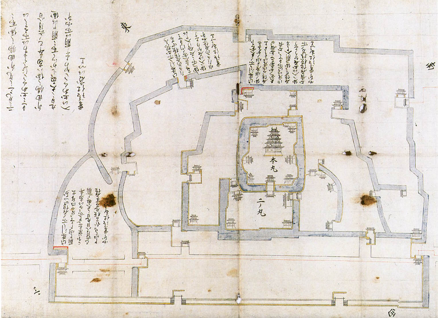 岸和田城図